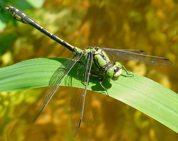 Gomphe serpentin (Ophiogomphus cecilia) Photo en haute résolution libre de droit, trouvée sur et retaillée par mes soins. L'original est une image JPEG, 2048x1536 pixels, 1236.11 Ko (1265773 octets) Adresse de l'original